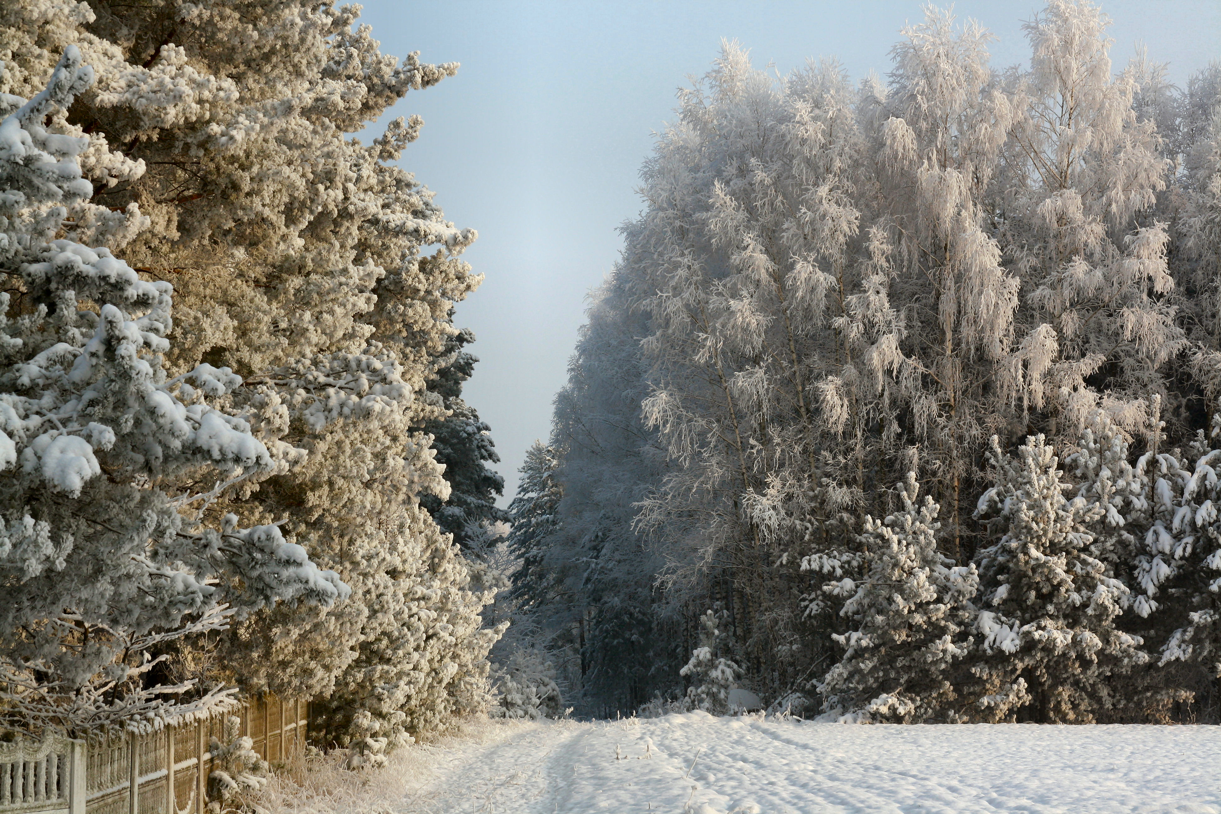 Nasza ,,Tajga,,.